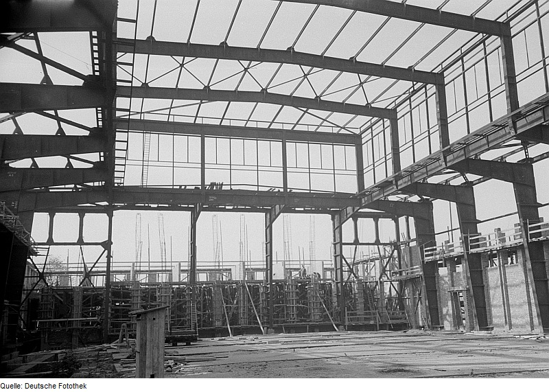 Original image description from the Deutsche Fotothek Blick auf das Stahlgerüst einer Sporthalle der Deutschen Hochschule für Körperkultur in Leipzig